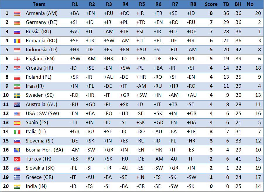 World League 2012 եզրափակիչ արդյունքներ